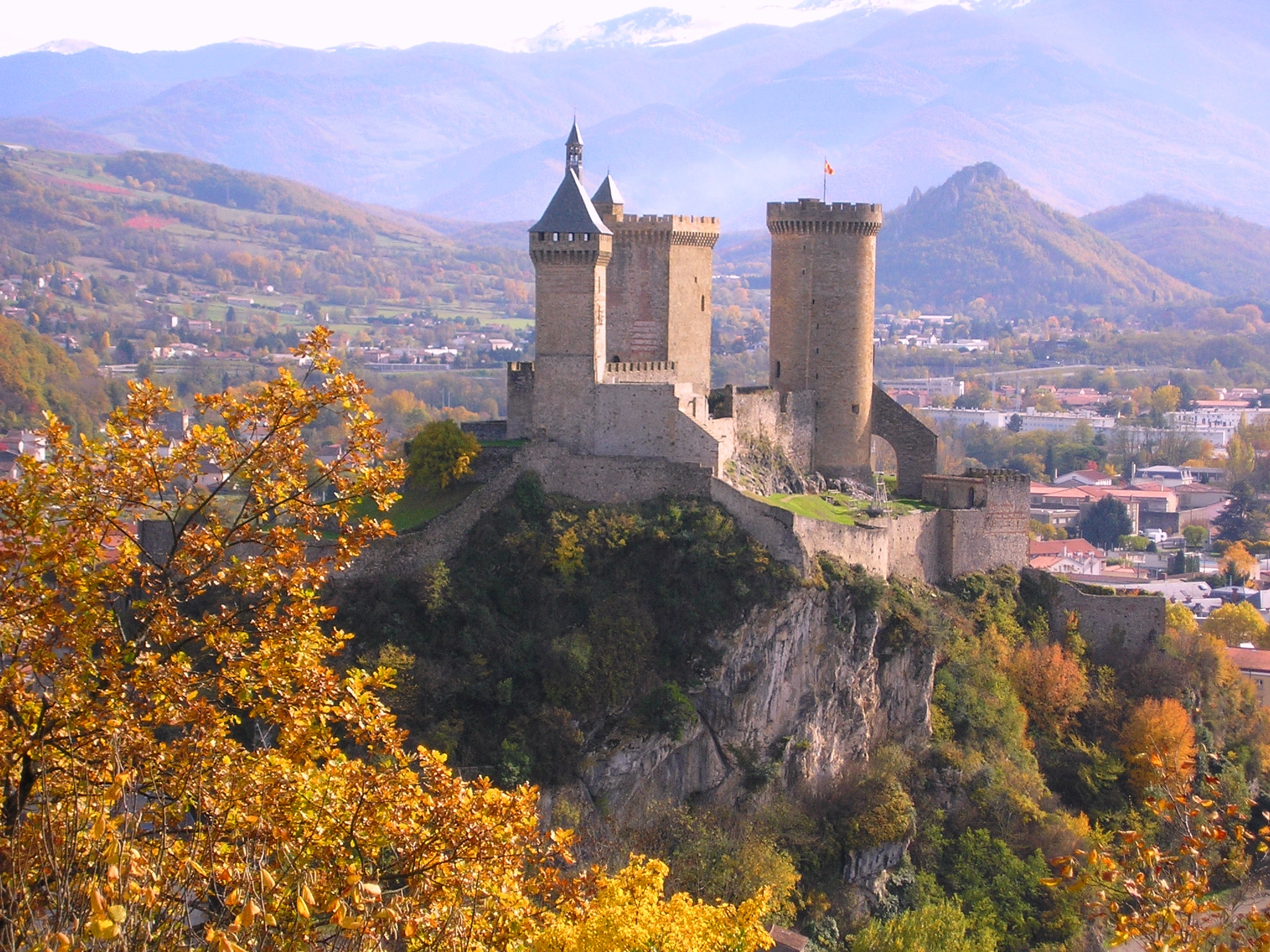 Le château de Foix vu de l'Espinet